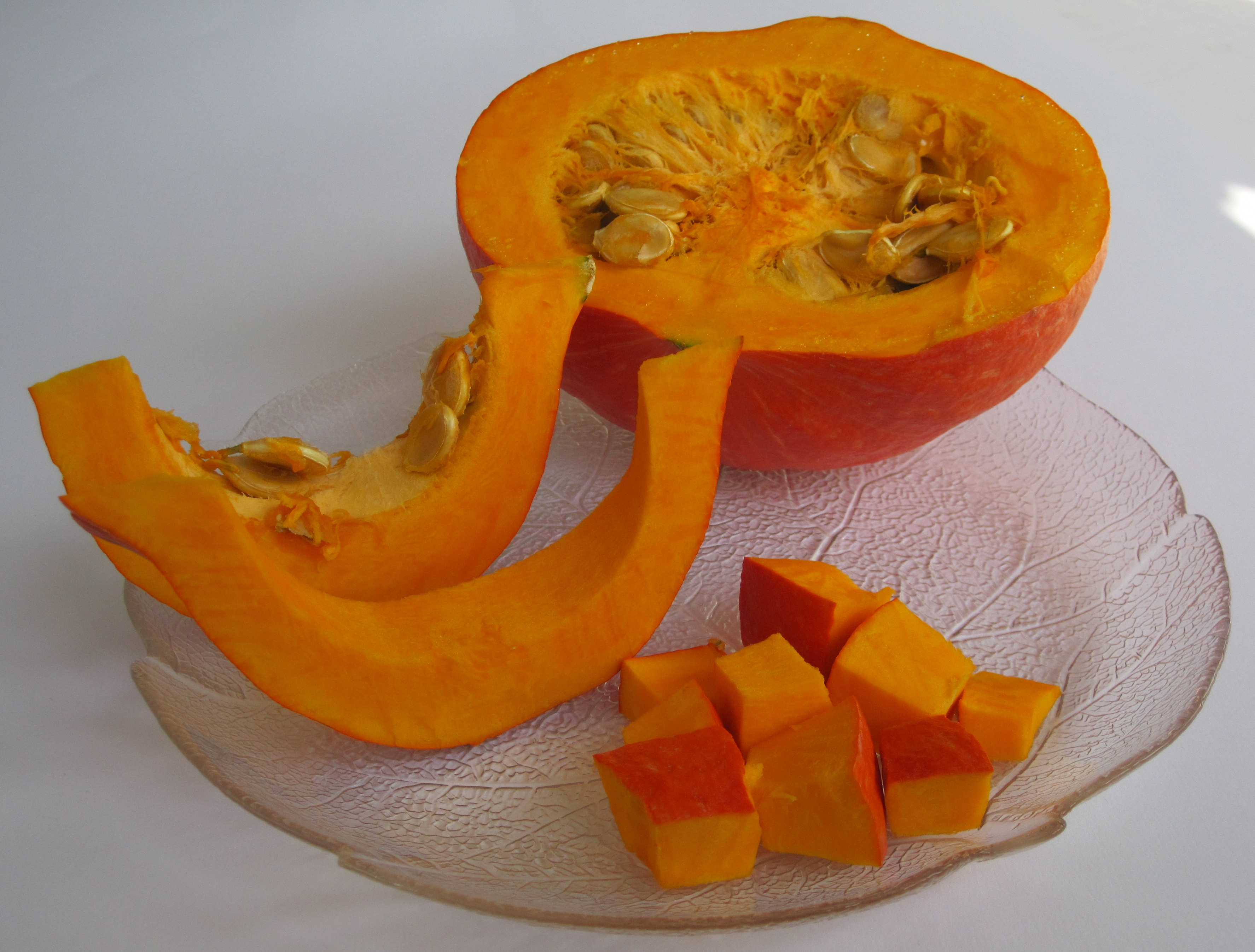 Hokkaidokürbis